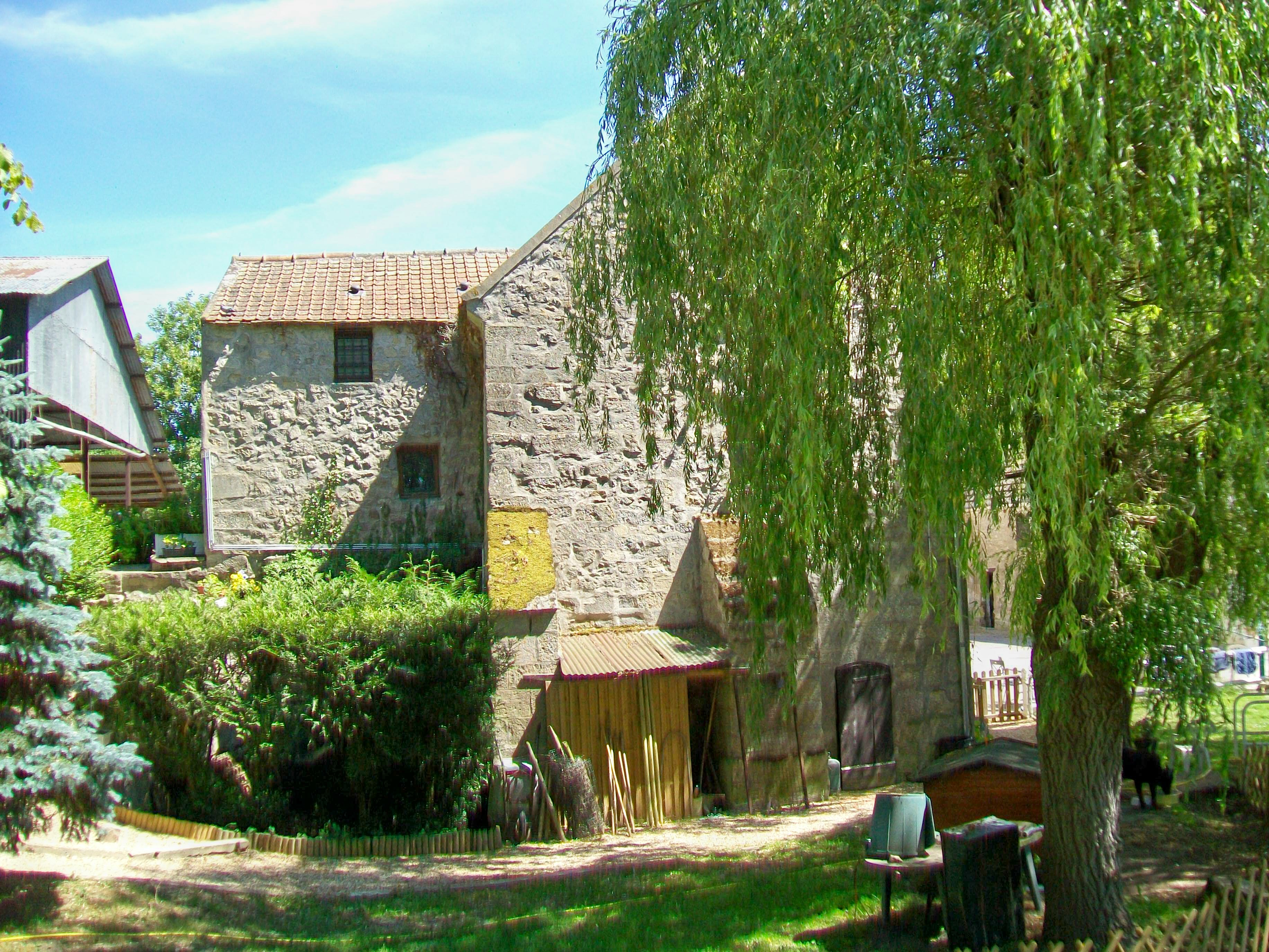 L'ancien moulin de Giez (commune de Viarmes), sur l'Ysieux. Le moulin de Giez existe depuis le Moyen Âge central et fut l'une des possessions de l'abbaye de Royaumont. Seul le pignon ouest reste à peu près dans son état d'origine, avec deux massifs contreforts et une petite porte.